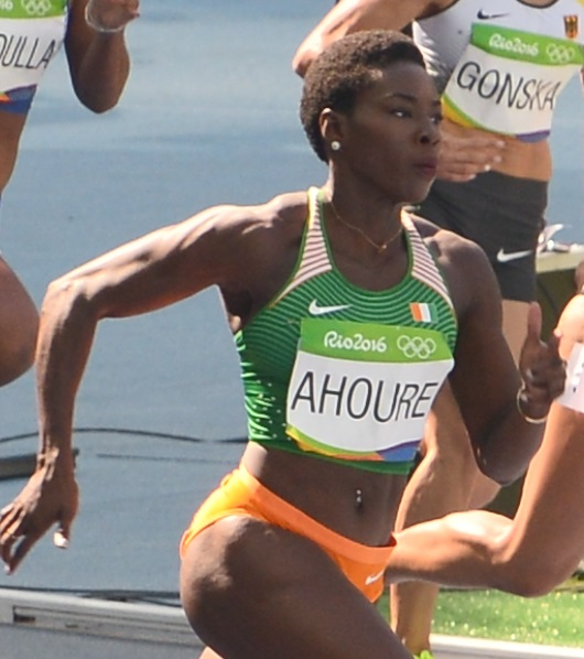 Murielle Ahouré dans 8éme série du 200m aux jo de Rio 2016